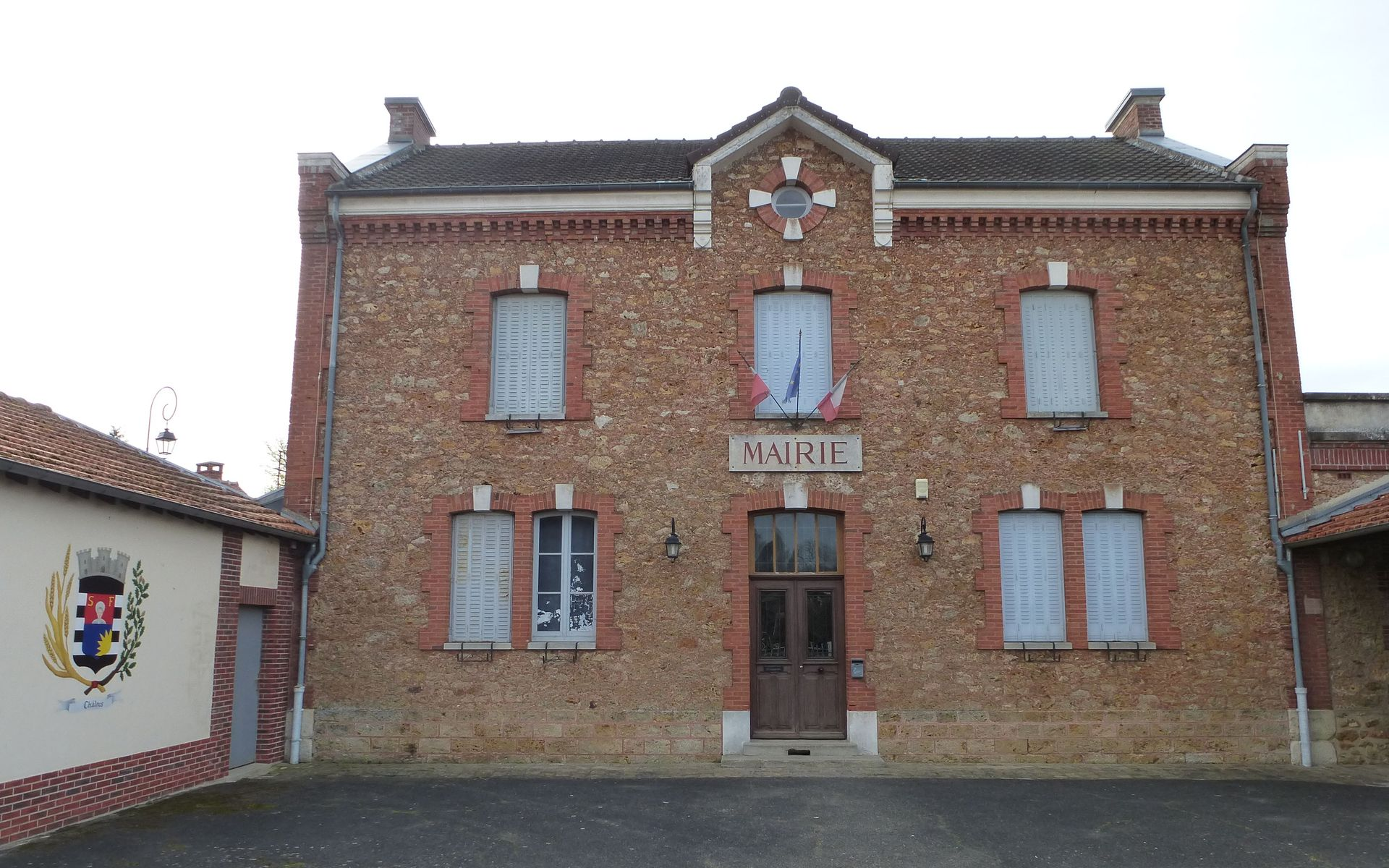 Façade de la mairie de Châtres